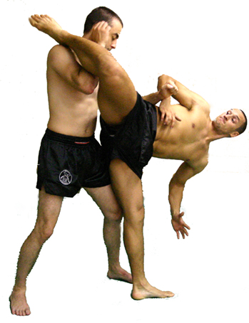 hookkick001.jpg